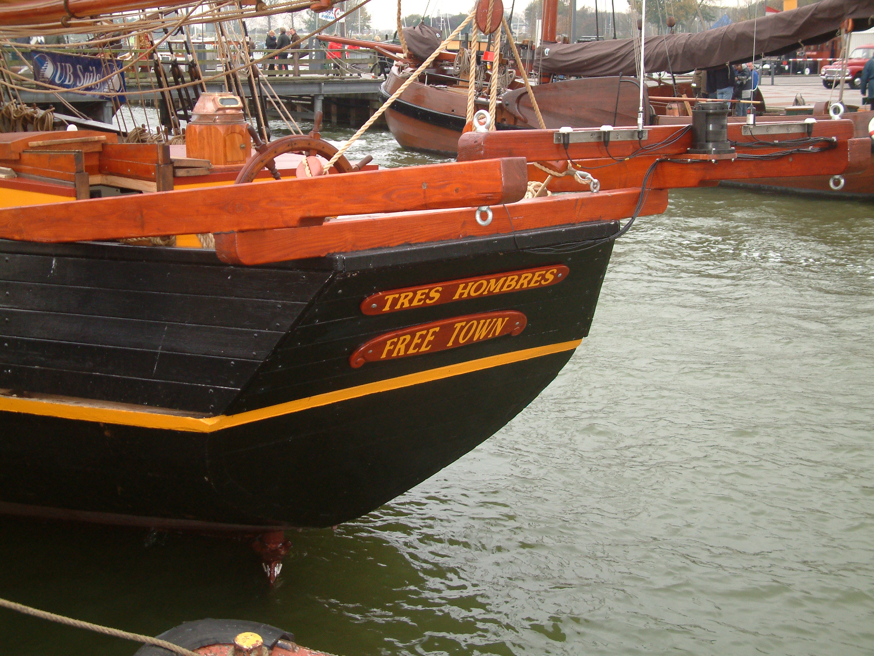 De TRES HOMBRES is een zeilend vrachtschip, dat probeert de zeilende handelsvaart nieuw leven in te blazen.